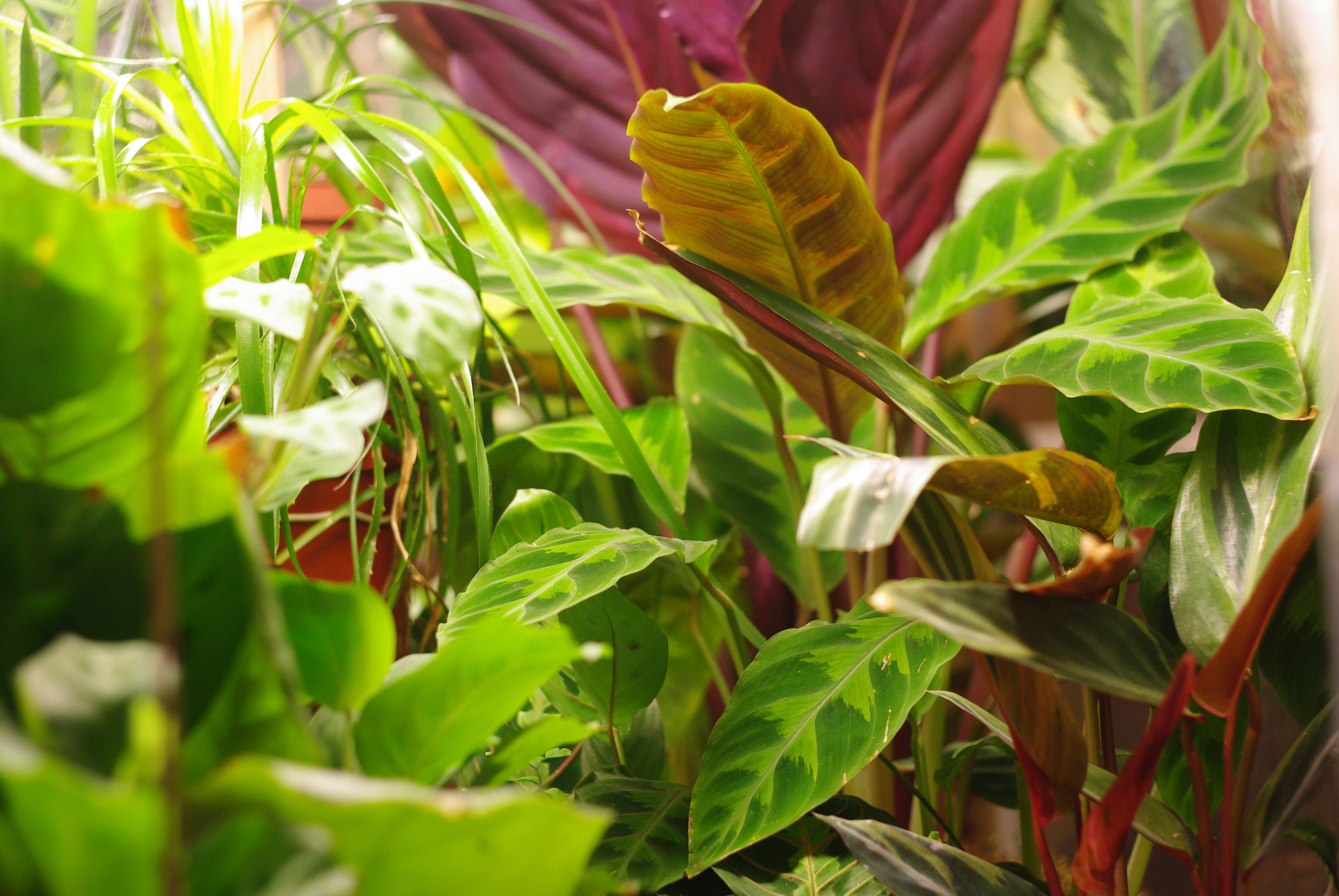 Калатея Варшевича в флорариуме